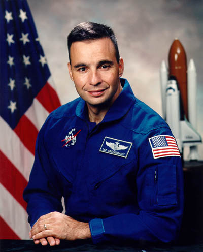 portrait astronaut Lee Archambault